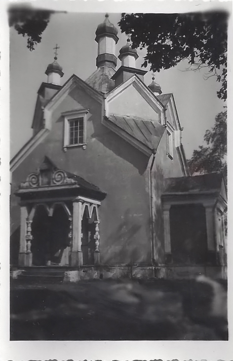 Беларуская (тарашкевіца): Любішчыцы (Lubiščycy). Ганьненская царква-мураўёўка